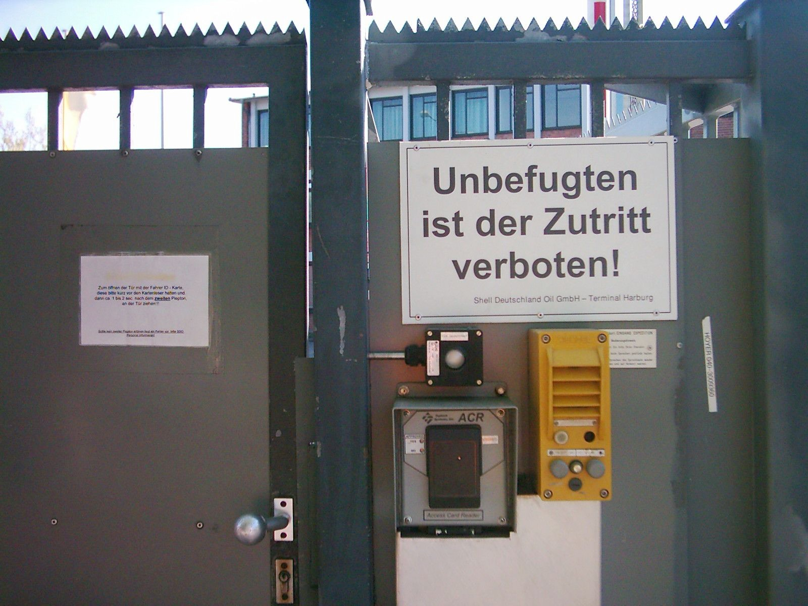 Zugangskontrolle am Shell Terminal Hamburg-Harburg.